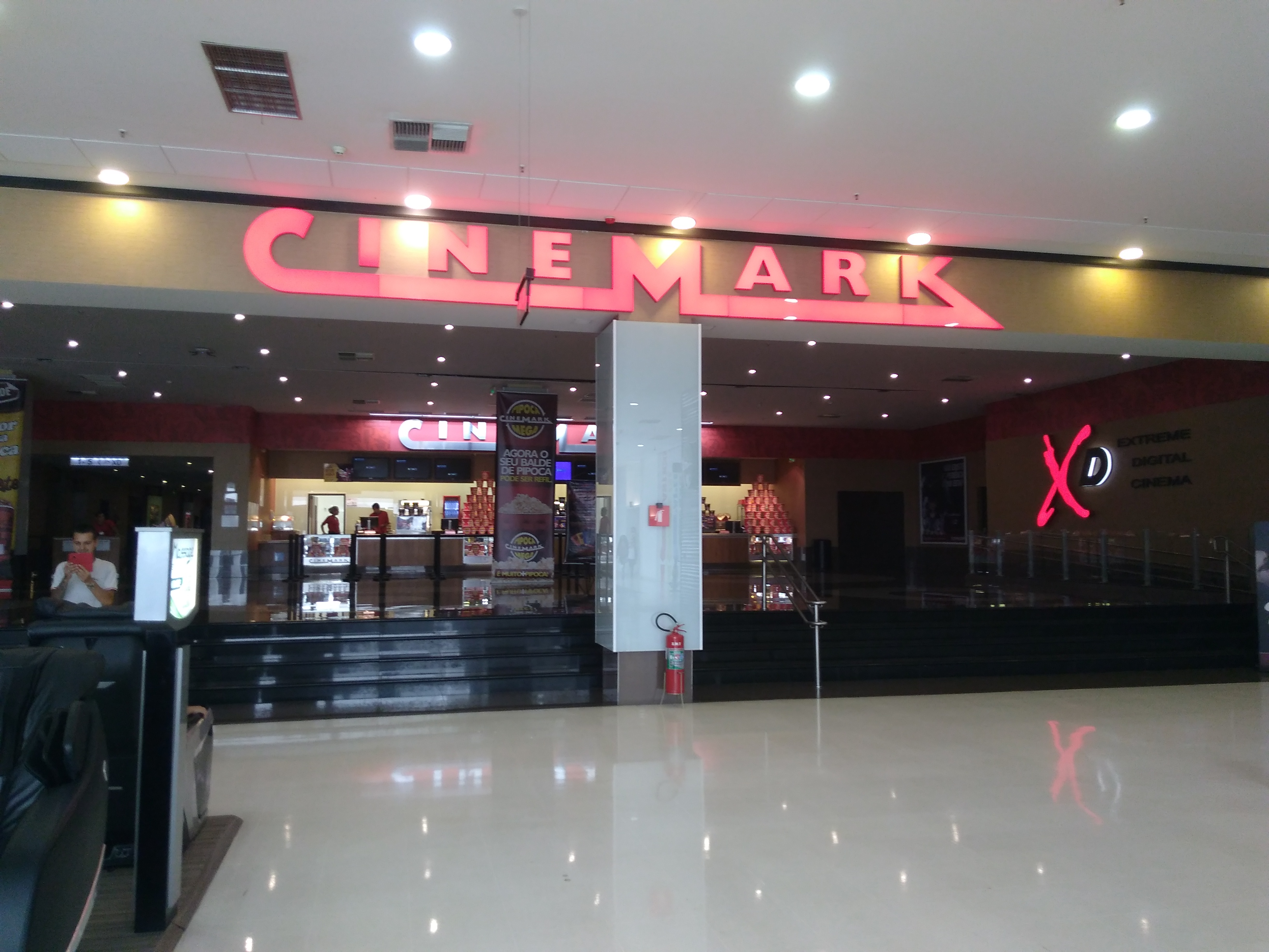 Vista da entrada do Cinemark Metrô Tucuruvi de São Paulo, SP